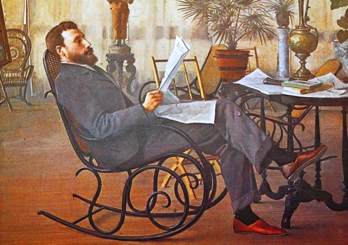 Alfredo Brañas oil on canvasmedium QS:P186,Q296955;P186,Q12321255,P518,Q861259 83x124 cm.